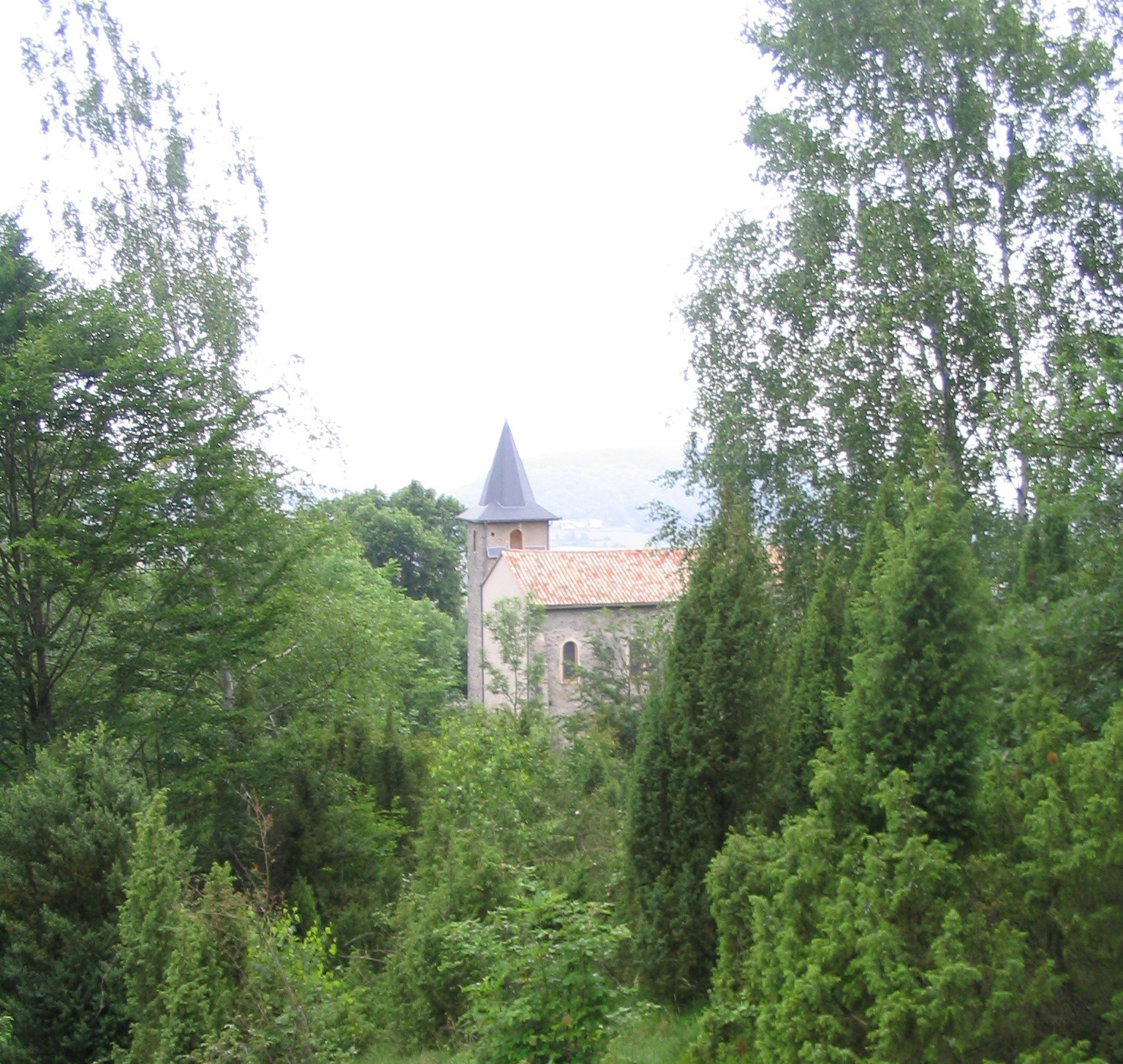 Saleich (Haute-Garonne, Midi-Pyrénées, France) : Chapelle de Vallatès.